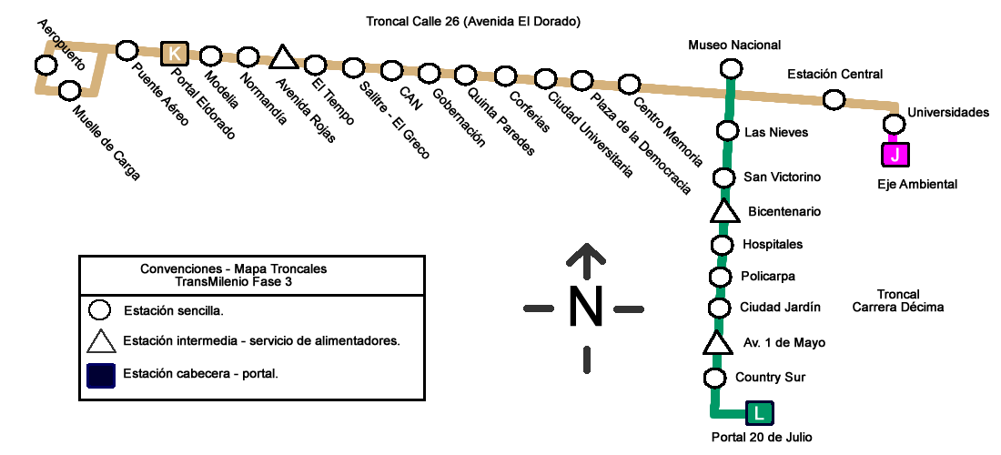 Mapa de las Troncales del Sistema TransMilenio, para la Fase 3, 2008-2010.